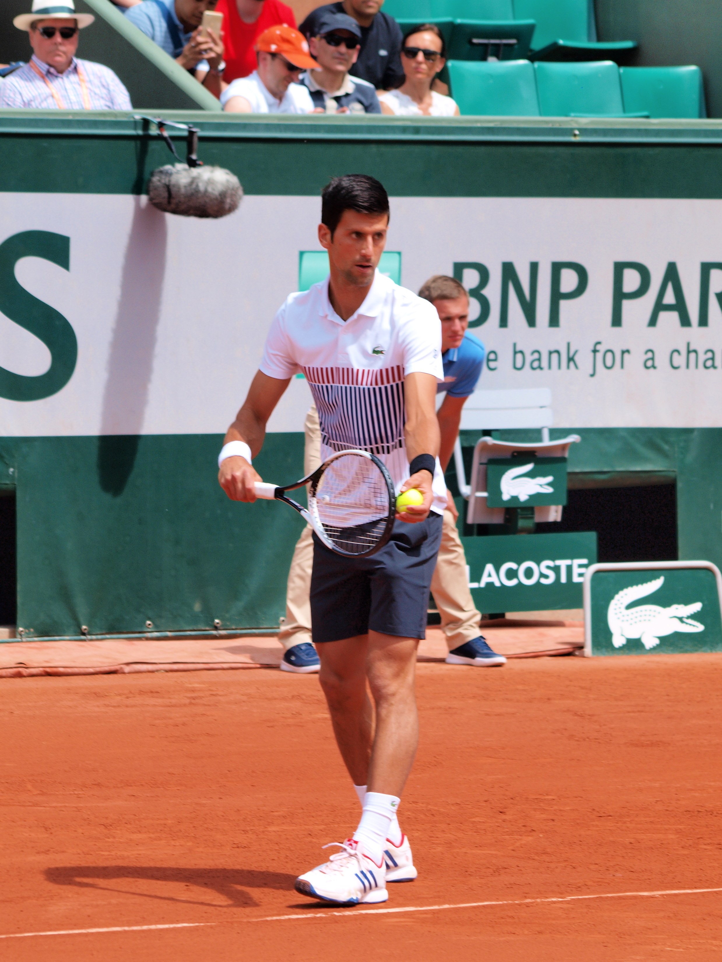 Novak Djokovic aux Internationnaux de France de Paris (stade Roland Garros) , le 31 mai 2017, dans son match contre João Sousa.